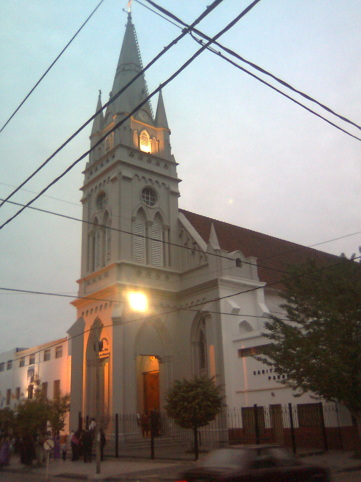 Iglesia Nuestra Señora de La Merced, en Villa Ballester, al norte del Gran Buenos Aires. Su construcción data de 1908.